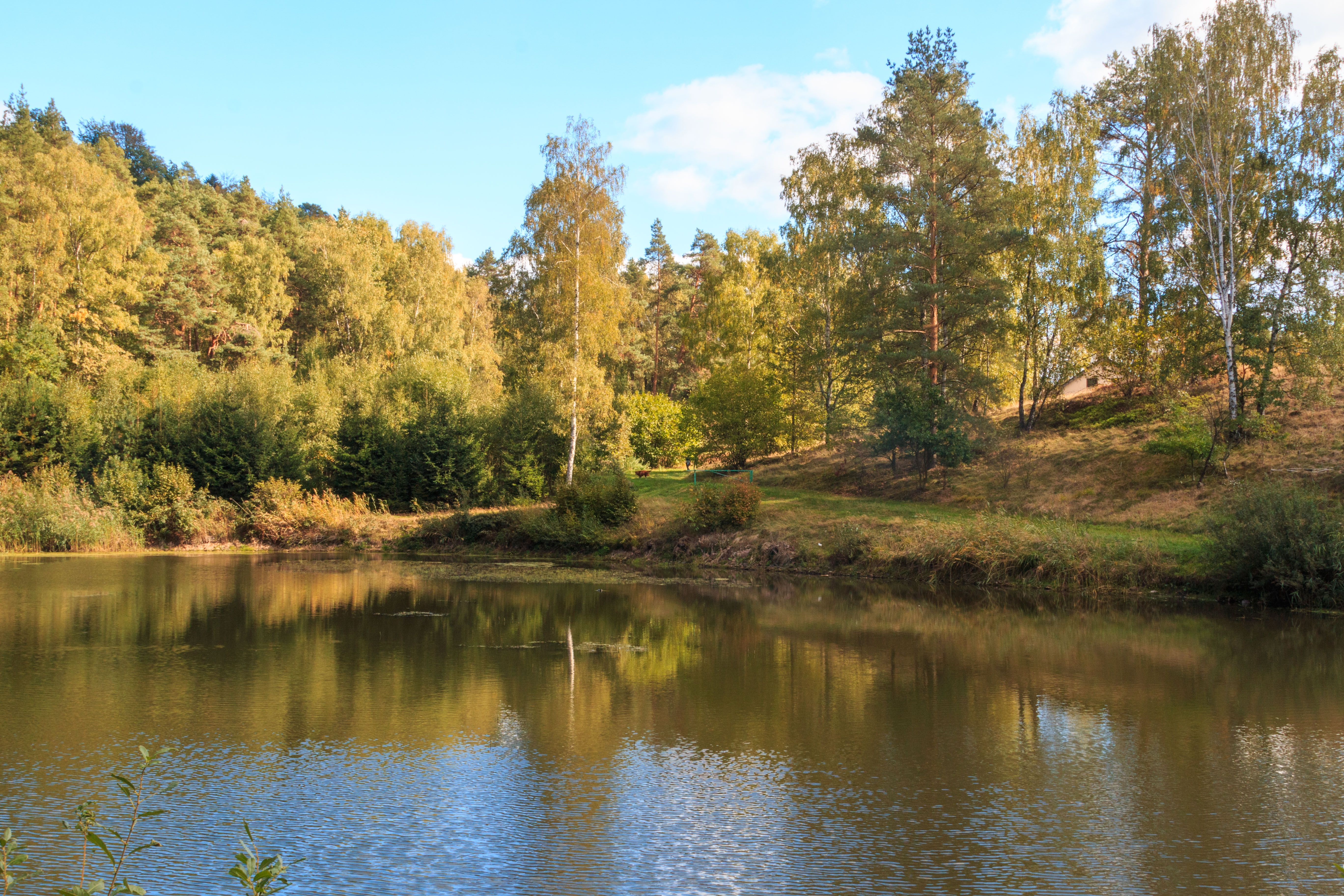 Třetí rybník u Cvikova Project: Vodstvo.